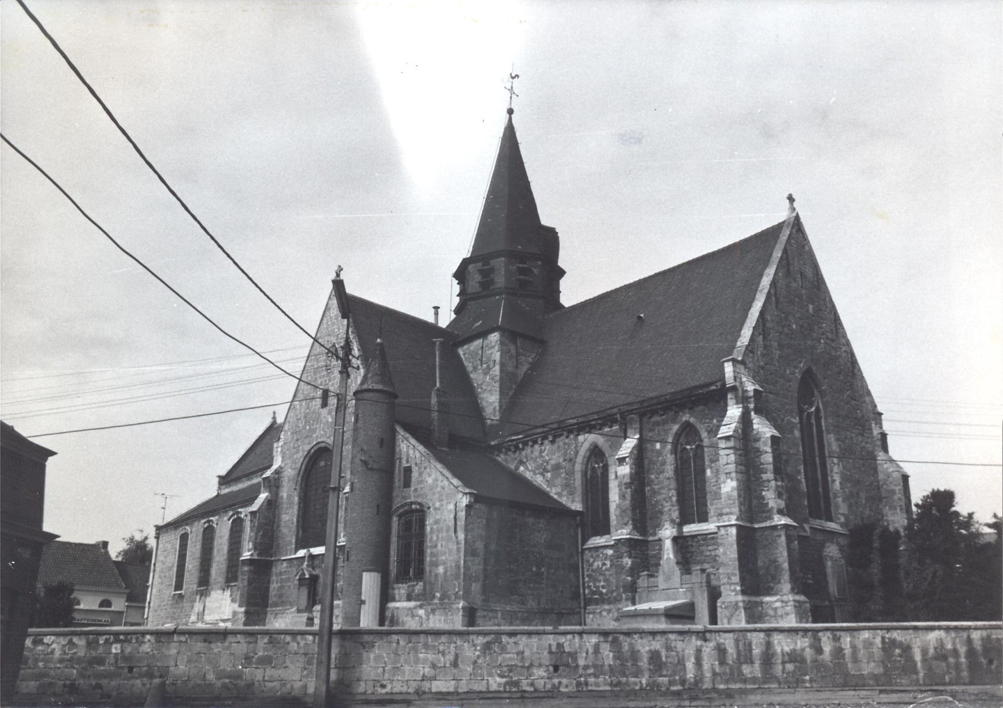 Aalst Hofstade Hofstade dorp O.L.Vr.Hemelvaartkerk